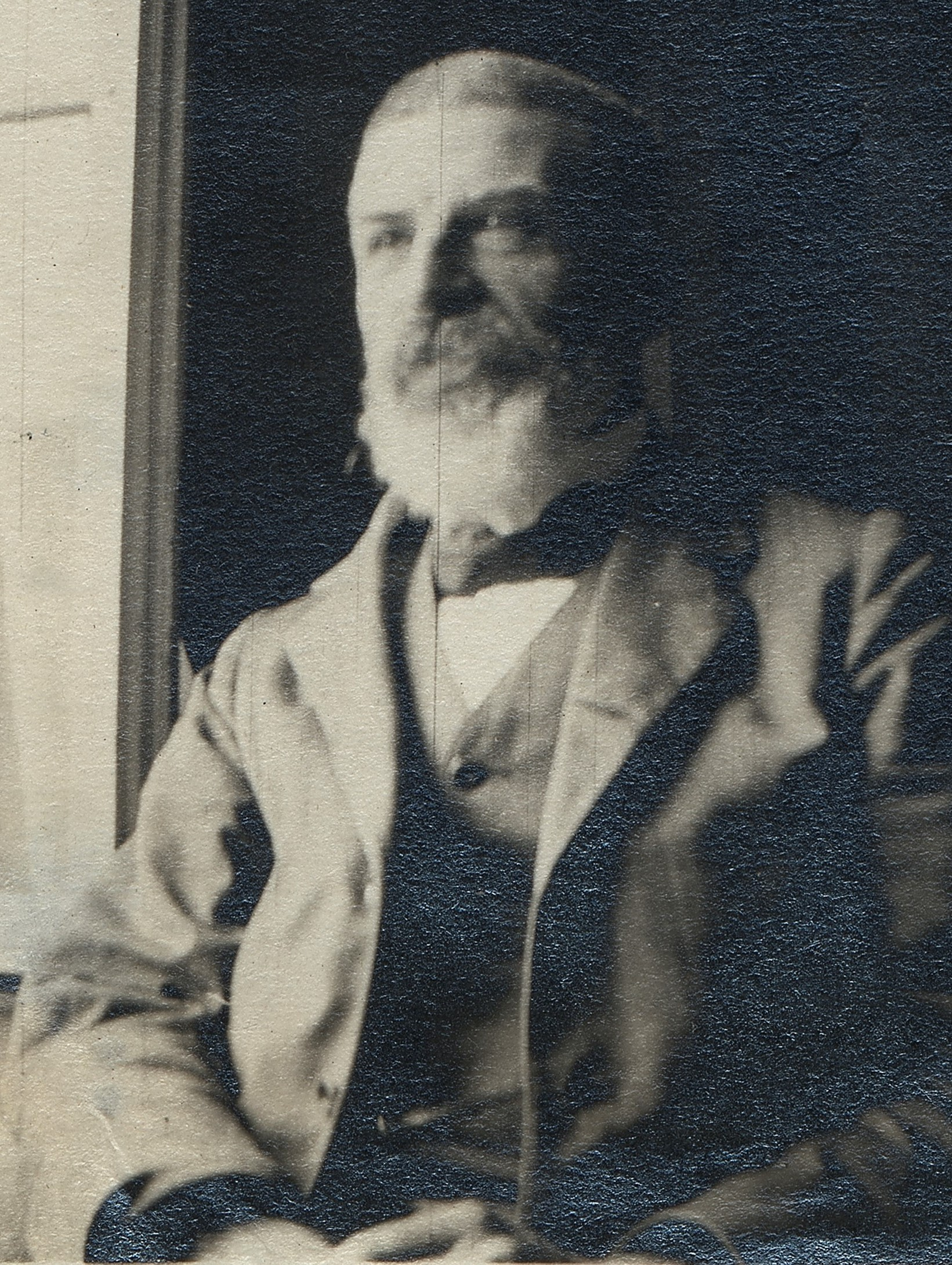 Porträt von Michele A. Besso, Datierung unbekannt (ETH-Bibliothek Zürich, Bildarchiv / Fotograf: Unbekannt / Hs_0304-1227-1232 / CC BY-SA 4.0)